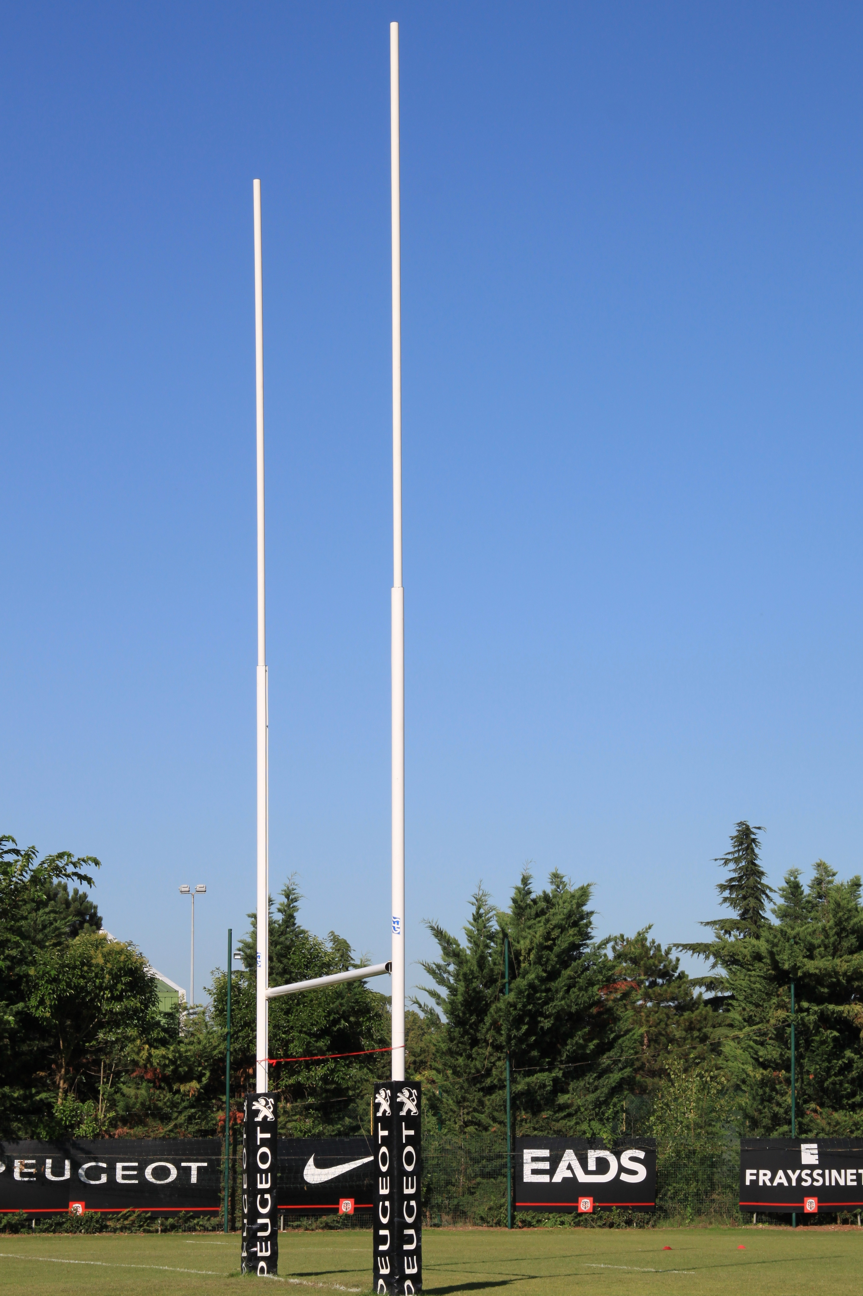 Poteaux du terrain d'entraînement du stade Ernest Wallon